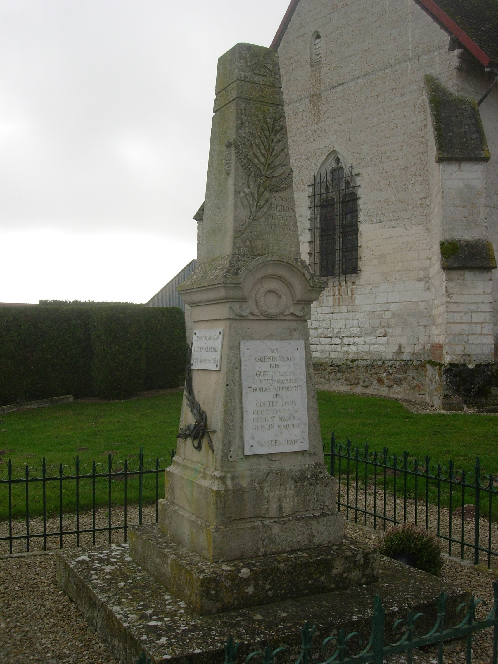 Monument aux morts d'Aubeterre (Aube - France)